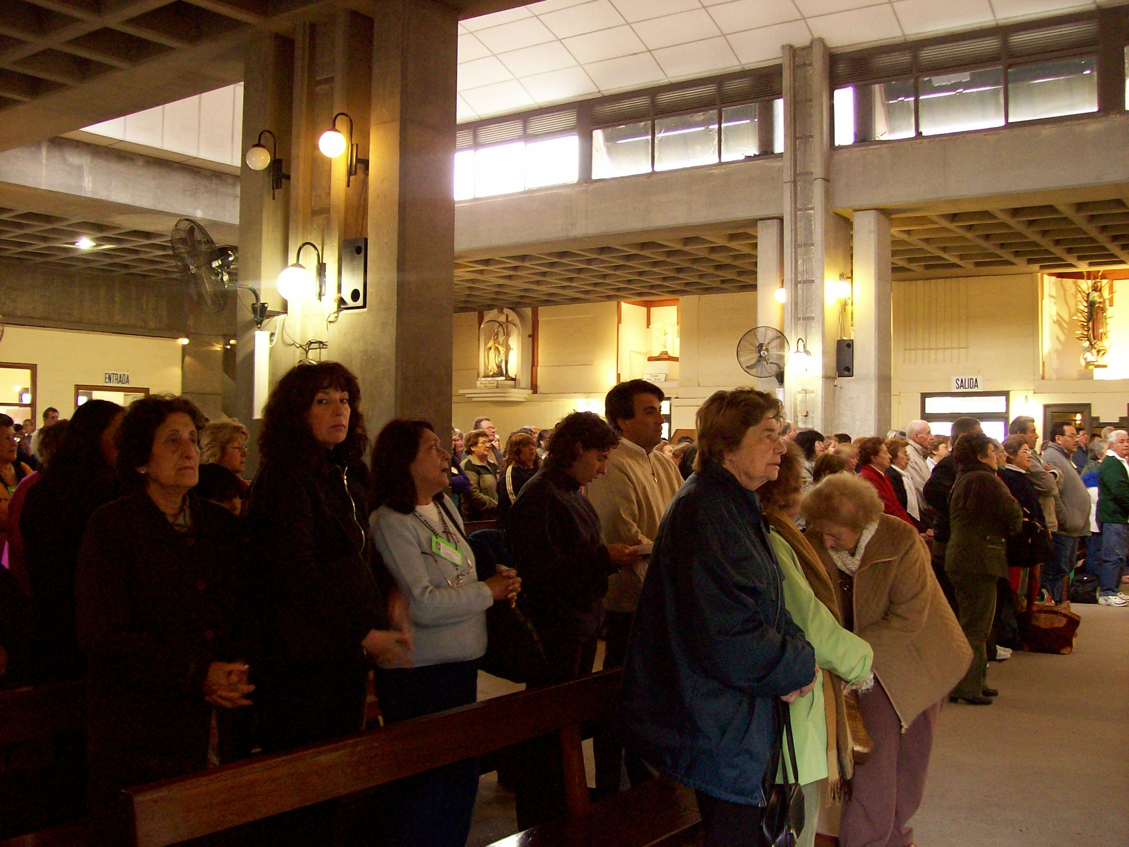 Pilgrins inside the Sanctuary of Nuestra Señora del Rosario de San Nicolás. San Nicolás de los Arroyos, Buenos Aires, Argentina.